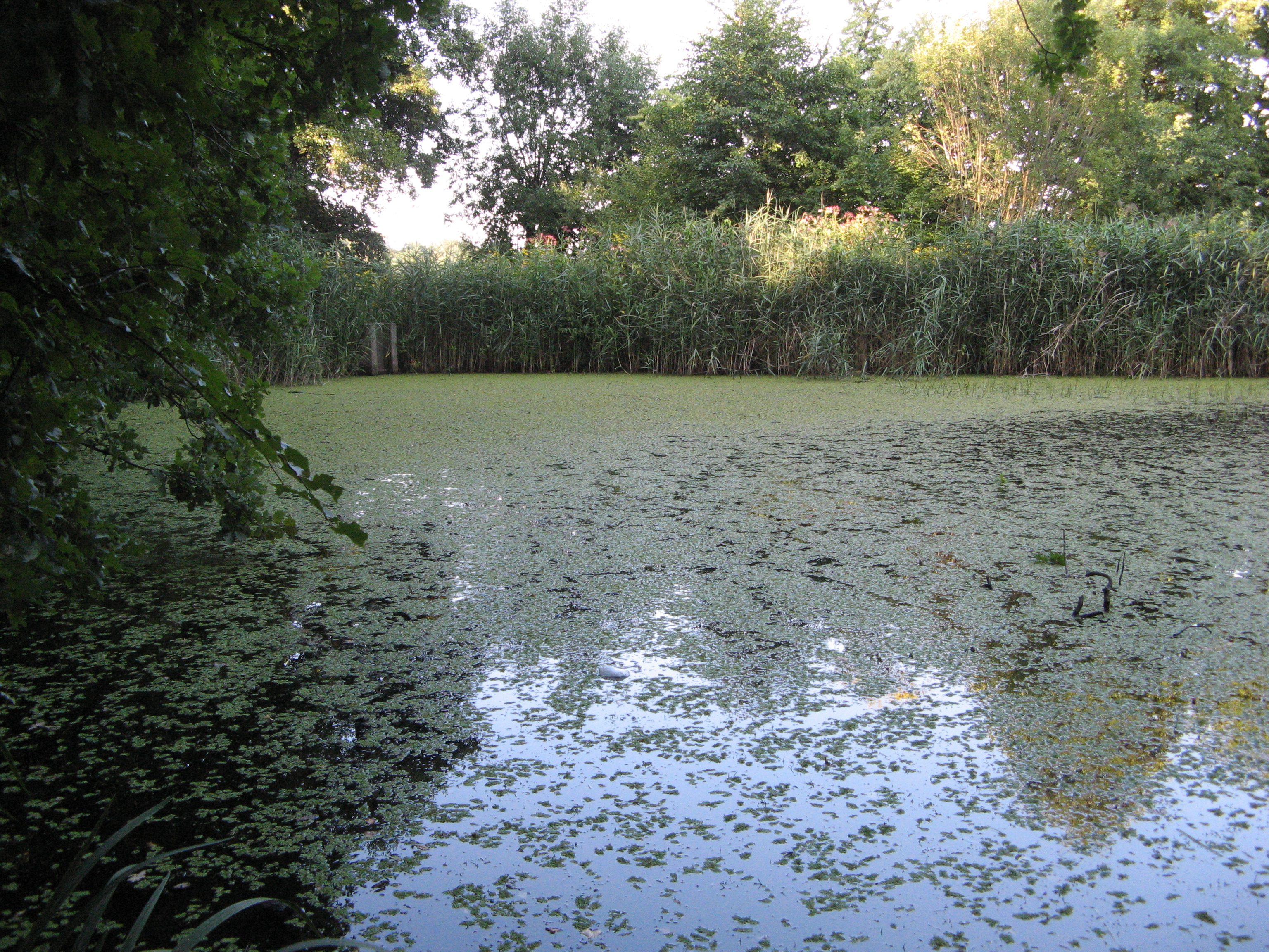 Salwinia pływająca na naturalnym stanowisku w Rezerwacie Przyrody Łężczok koło Raciborza